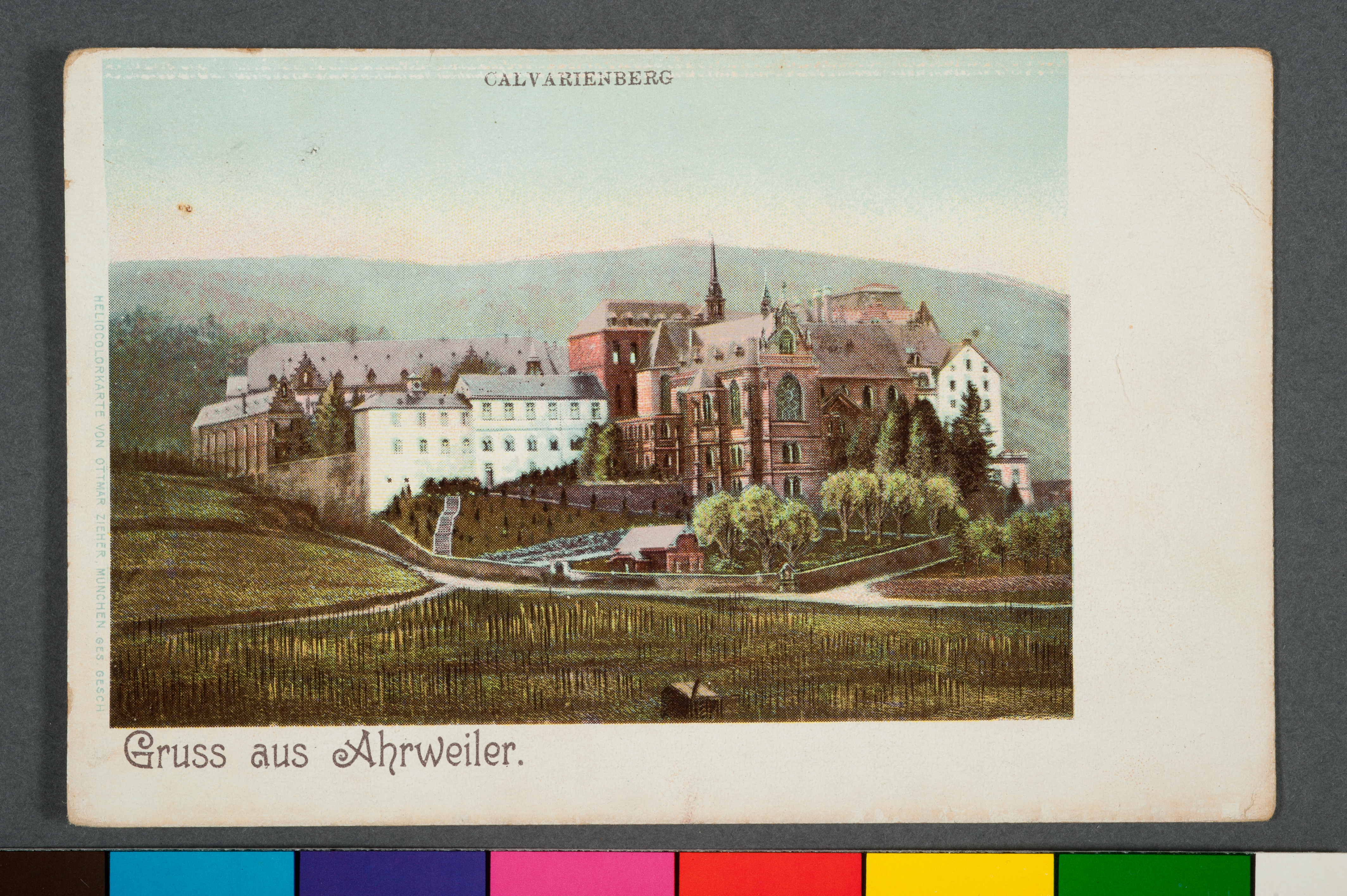 Obra que integra o acervo do Museu Paulista da USP. Coleção Cartões Postais